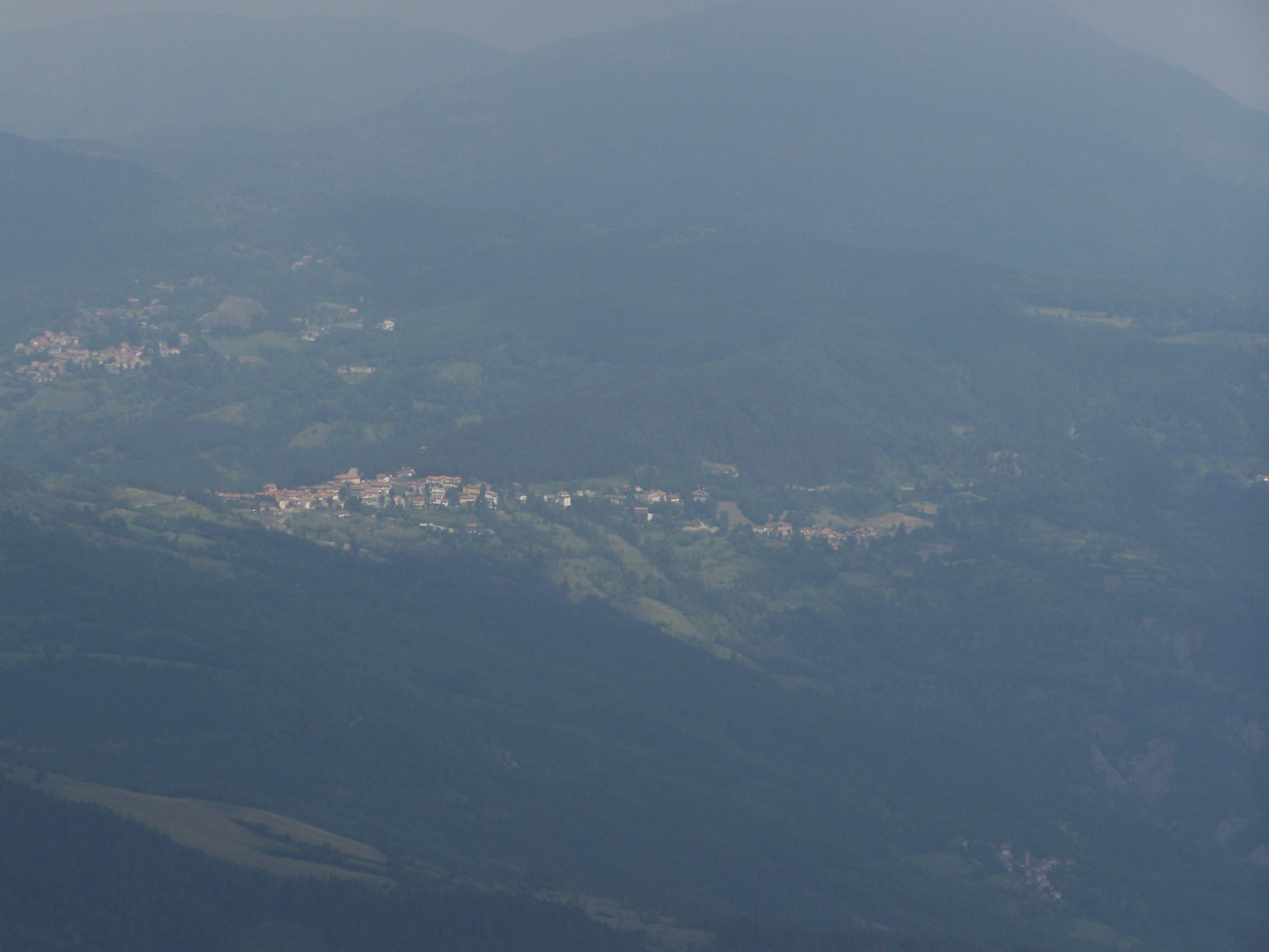 Il passo del Brallo dal Monte Lesima